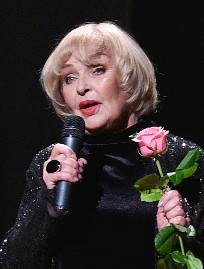 Ада Роговцева. Киев, НАДТ имени Ивана Франко